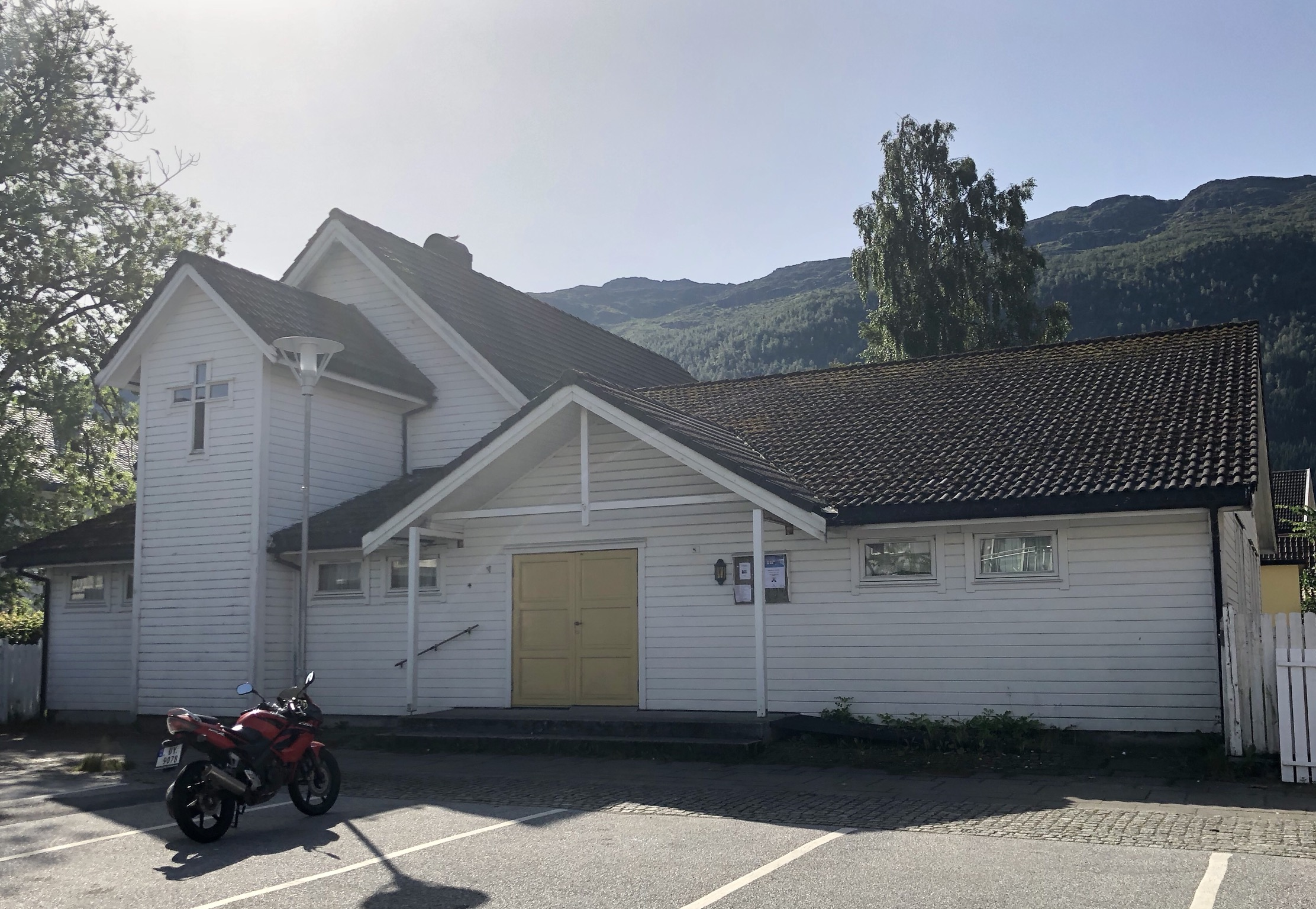 Bethanien in Nordfjordeid